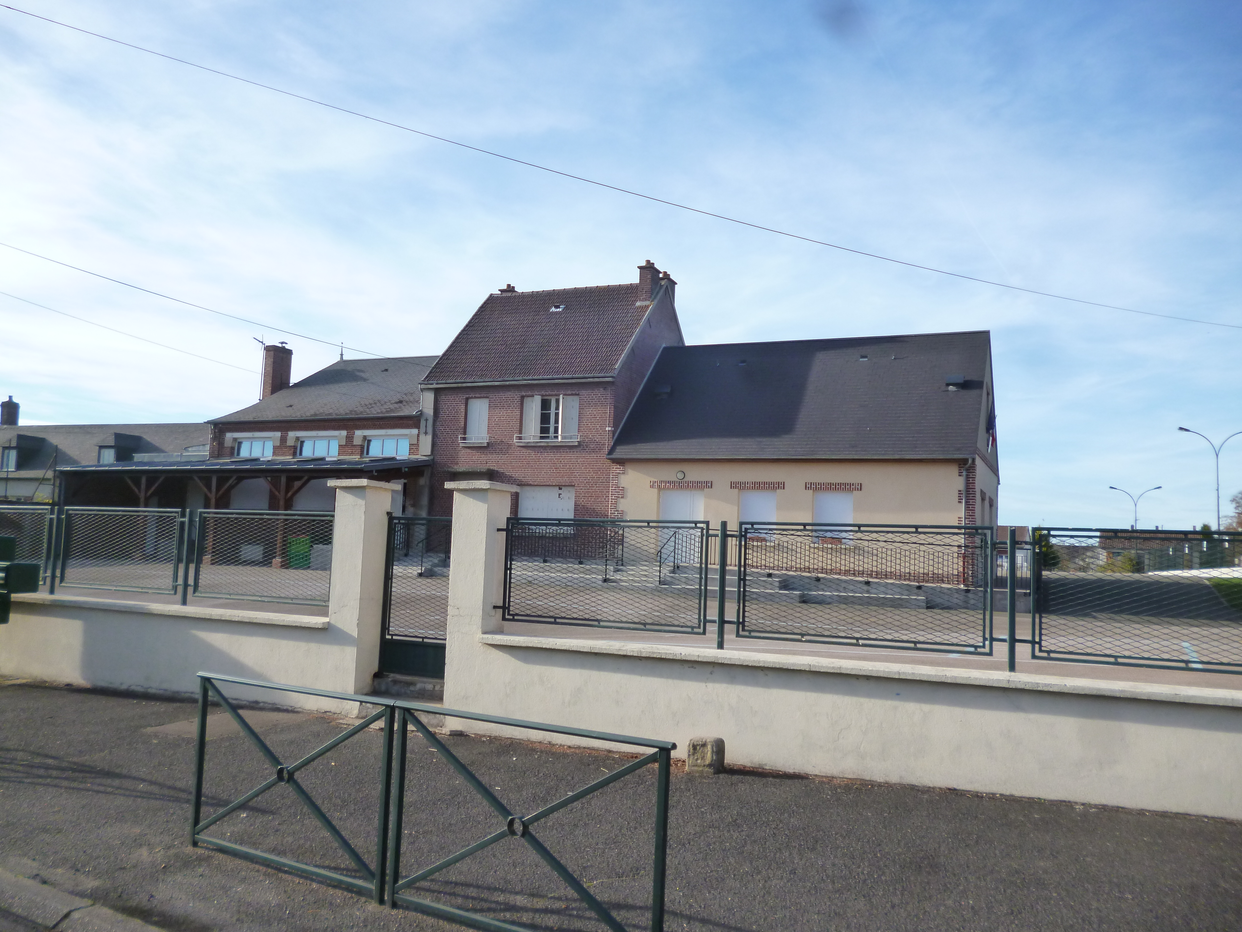 Ecole de la commune de Noyers-Saint-Martin (Oise).